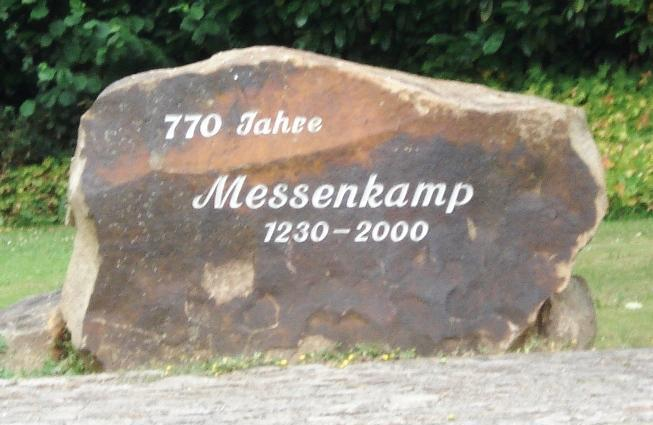 Gedenkstein in Messenkamp